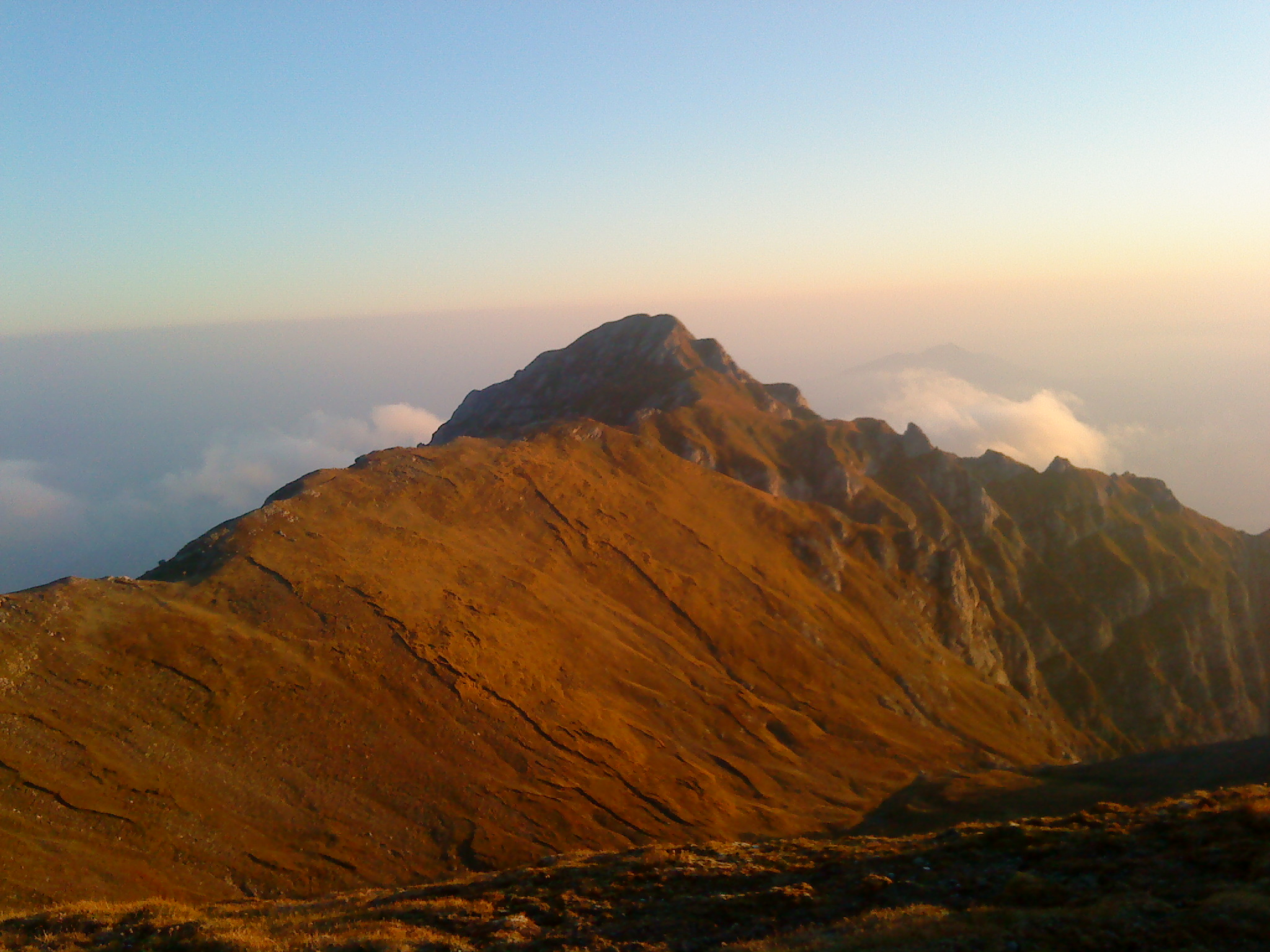 Varful Bucsoiu, Muntii Bucegi. Altitudine 2492 m.